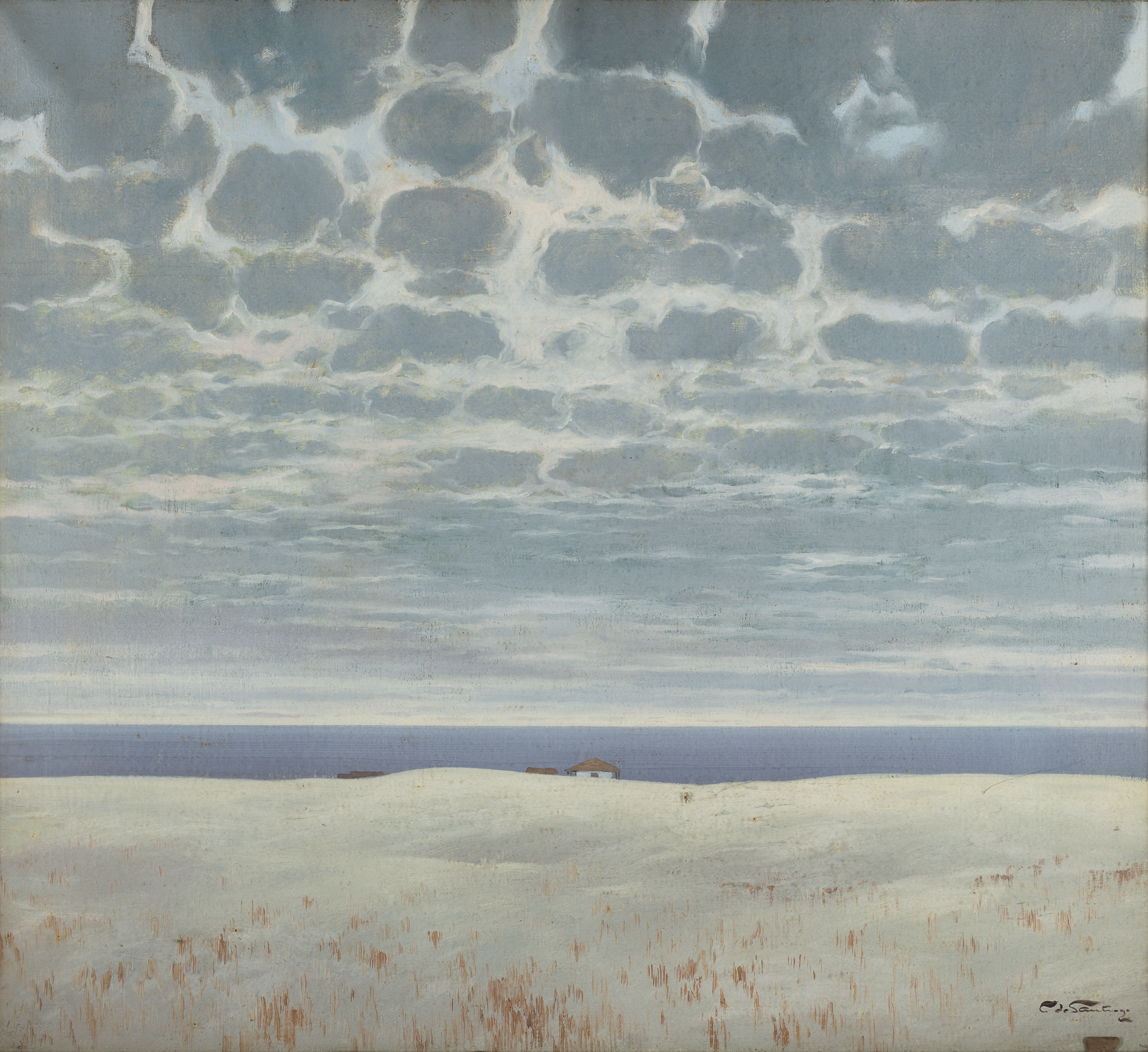 Obra "Cielo Empedrado" del pintor uruguayo Carlos de Santiago. Óleo sobre tela de 90 cm. de alto x 100 cm. de ancho. Fotografía de la obra tomada por Eduardo Baldizan.